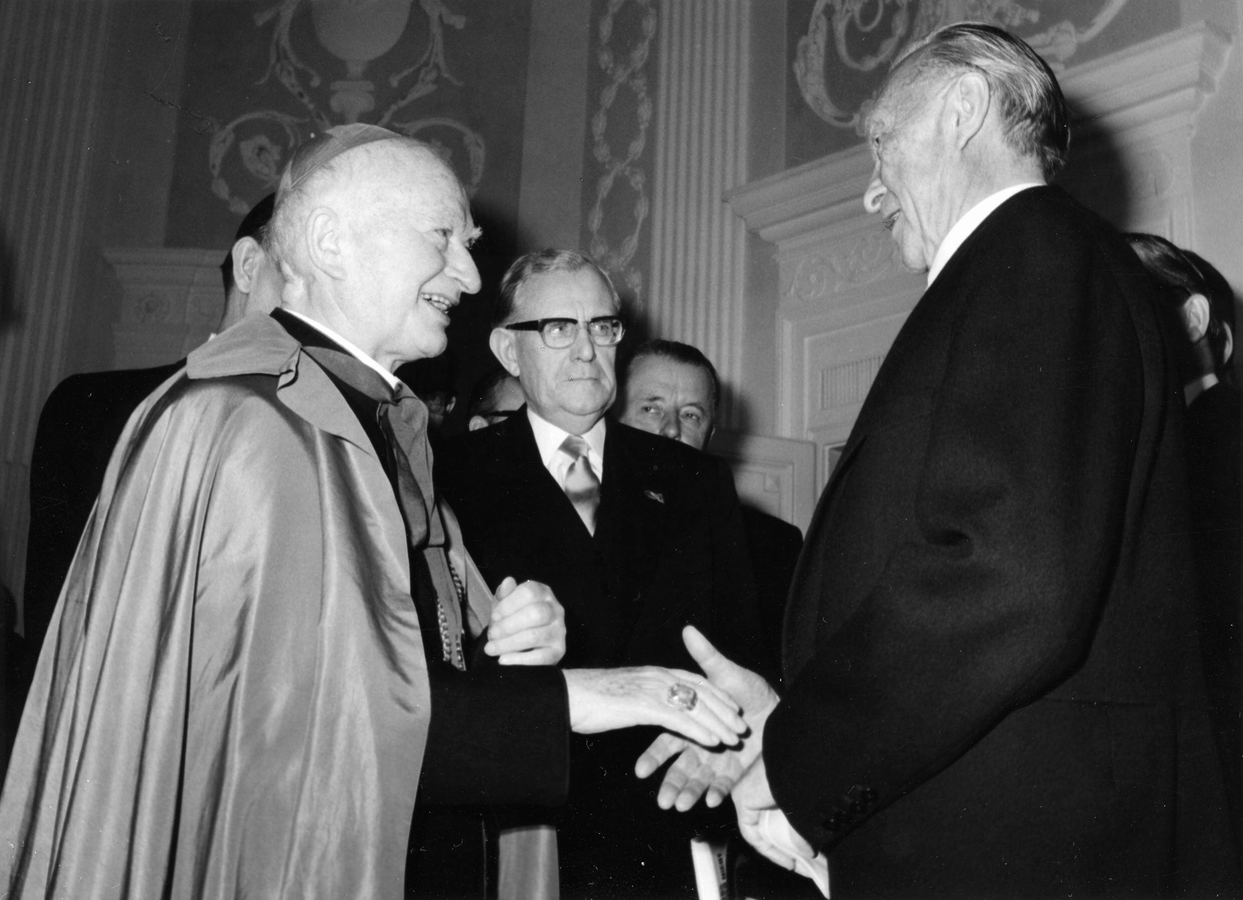 Adenauer, KonradFeier zum 88. Geburtstag in der Redoute, 05.01.1964